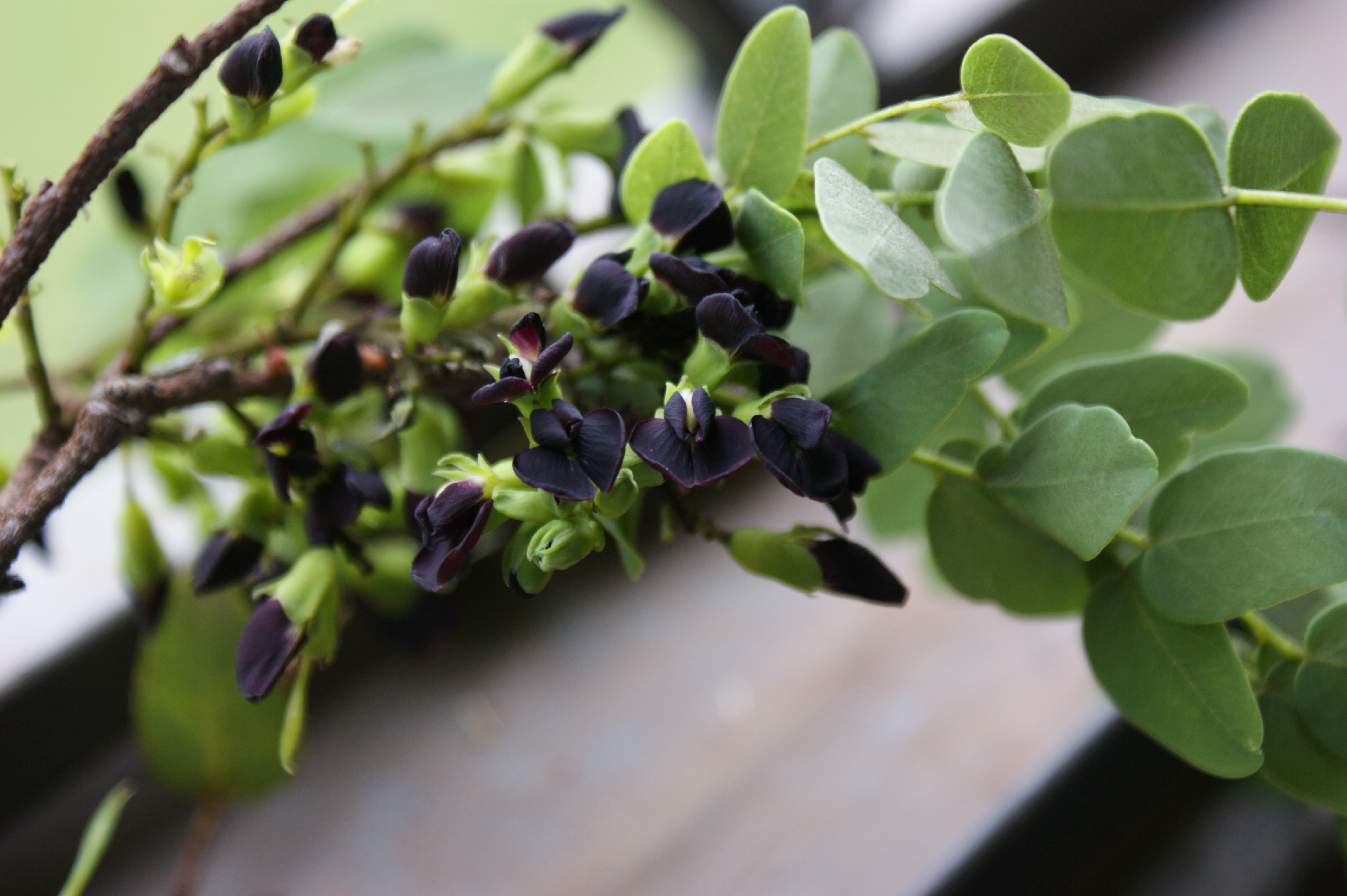 Dalbergia miscolobium, Fabaceae, Faboideae - Brasilien/Brasil: Distrito Federal, Jardim Botanico de Brasília